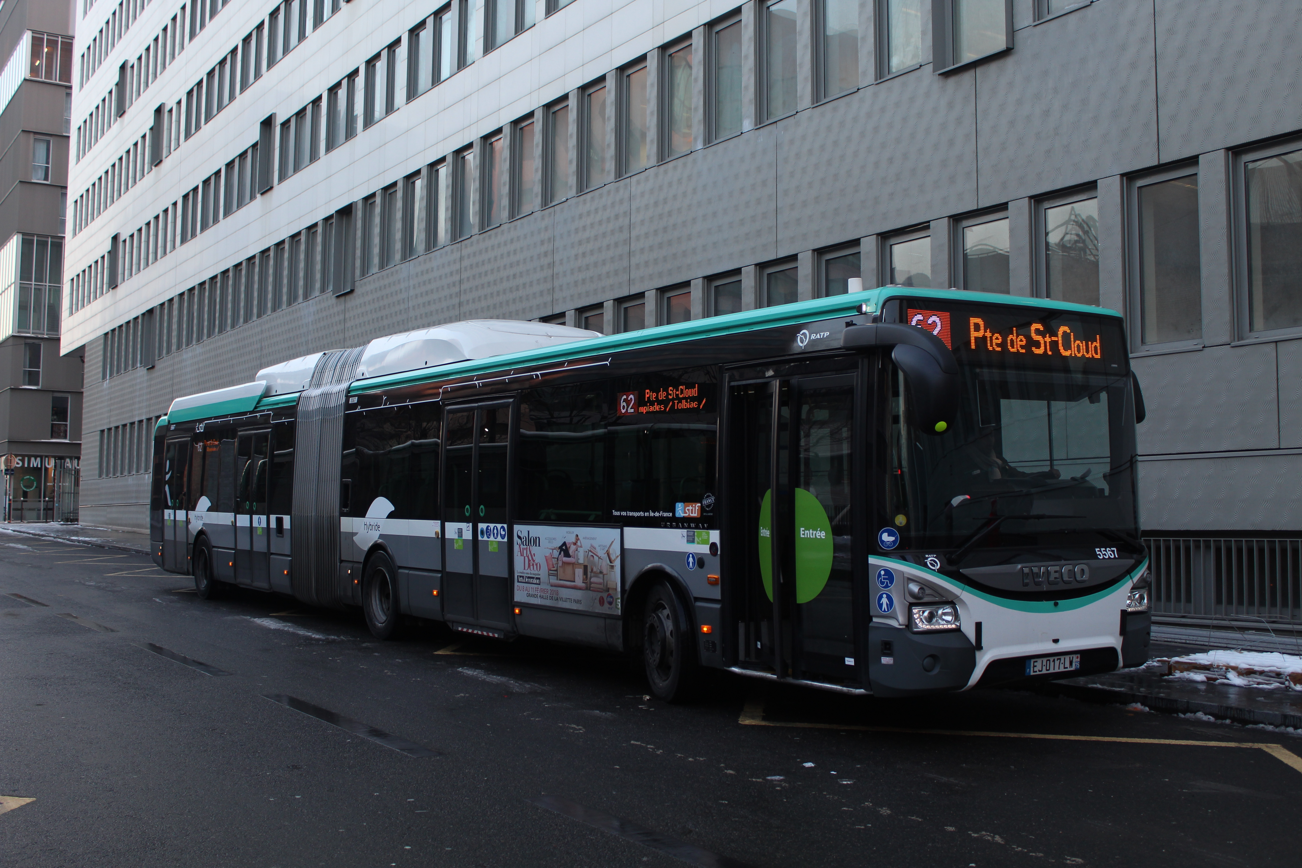 IVECO Urbanway 18 Hybride n°5567 sur la ligne 62 RATP.